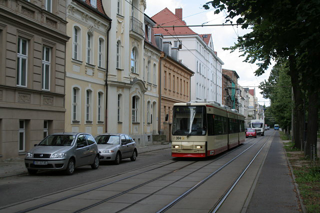 Lindenstrasse, Frankfurt (Oder)